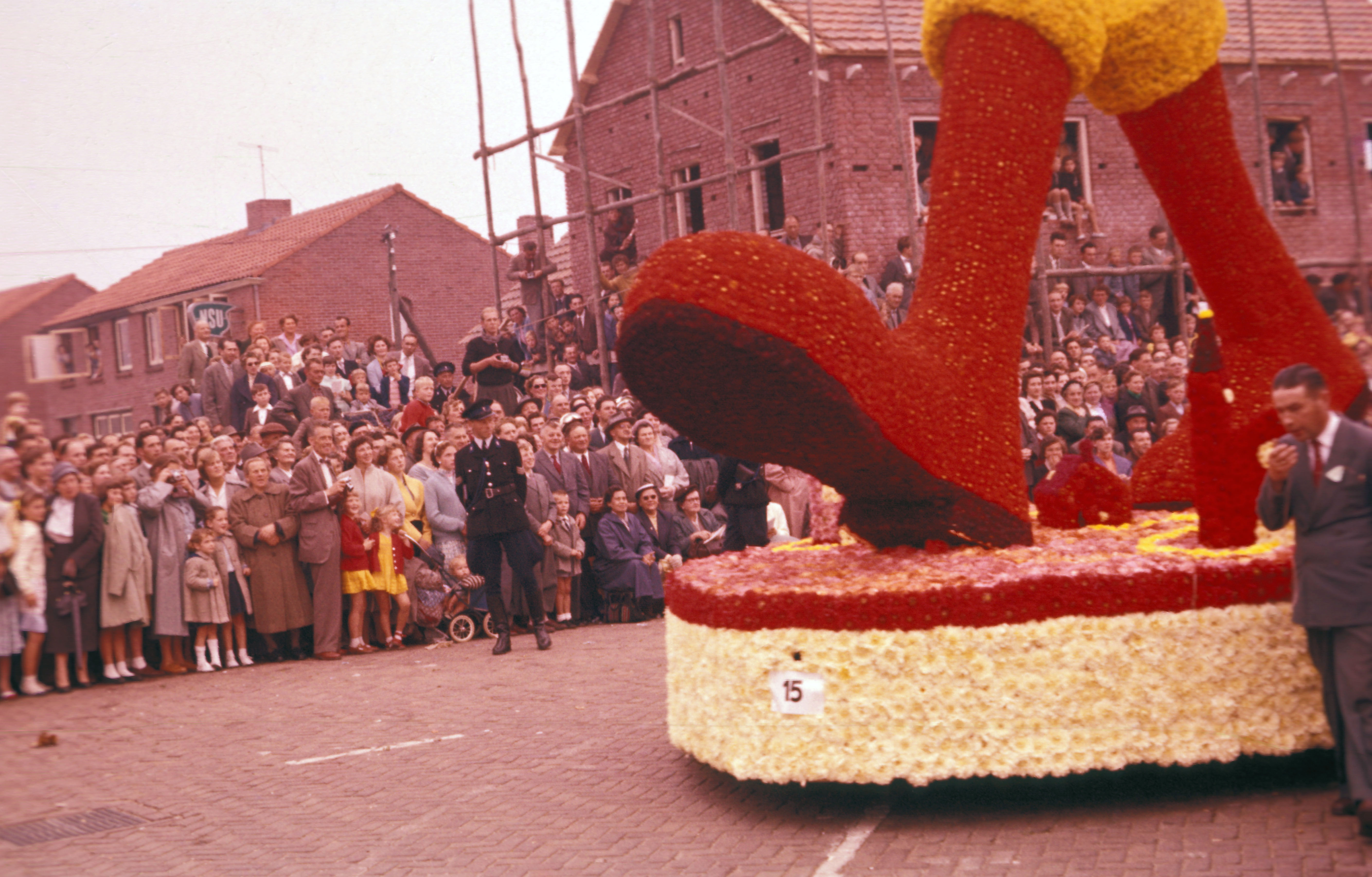 Illustratie van de grote drukte bij Bloemencorso Zundert in de jaren vijftig. De foto is uit 1956 (de wagen 'Klein Duimpje' van buurtschap Kapelleke).